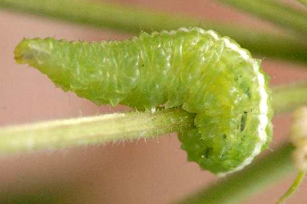 Dryobotodes eremita from Commanster, Belgian High Ardennes .